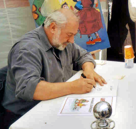 Urbain Servranckx (Urbanus) signeert een strip: In bobbejaanland (2004)